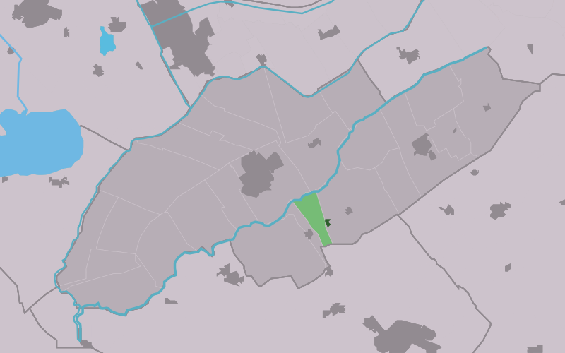 Kaartsje fan himrik fan Pepergea